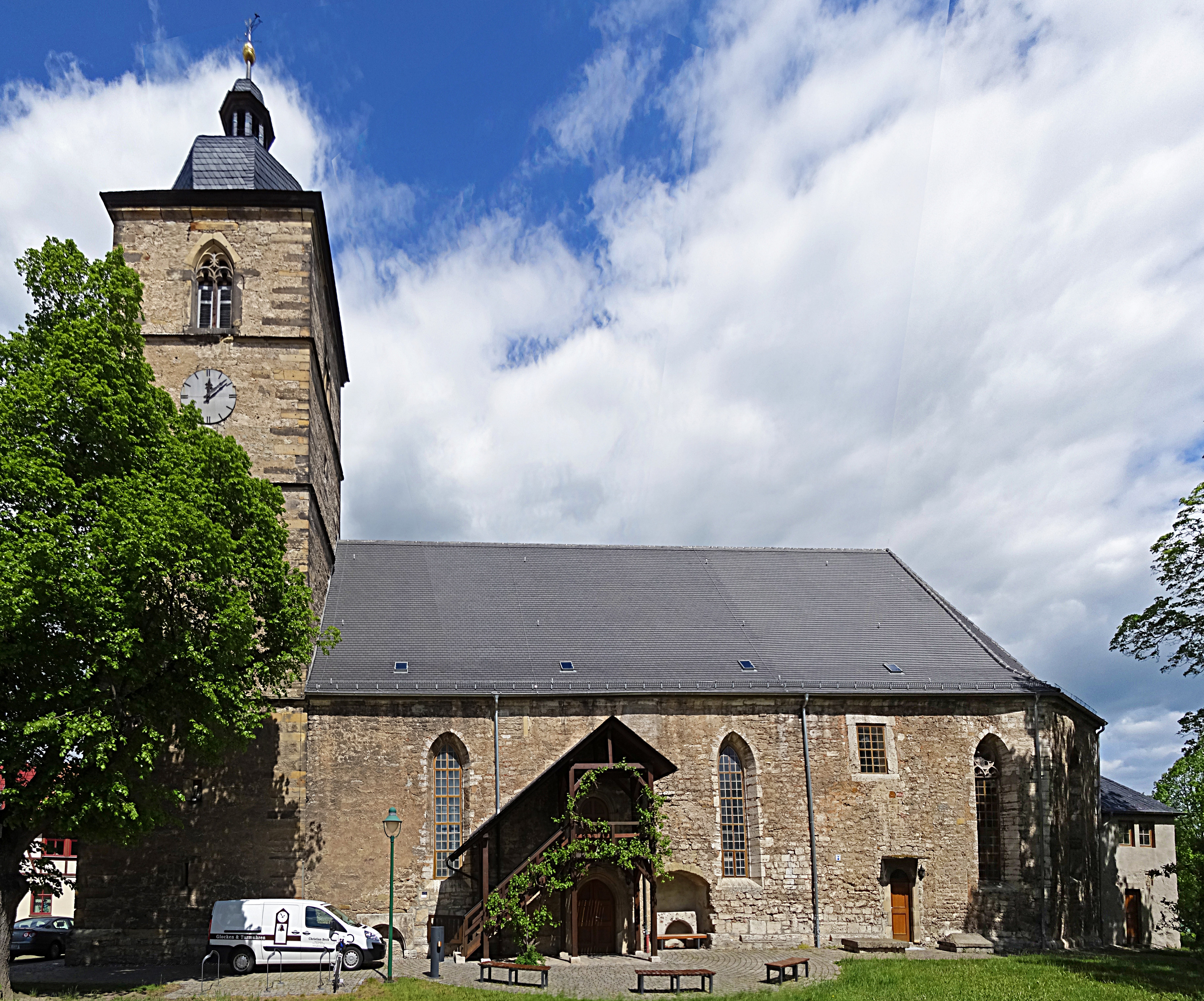 Stadtkirche St. Laurentius (Gebesee) von Süden